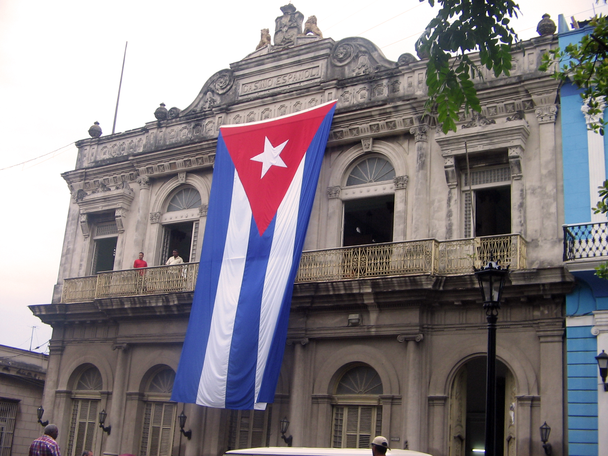 antiguo casino español en la plaza de la libertada cuidad de matanzas hoy en dia convertida en la biblioteca gener y del monte